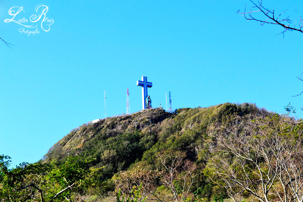 Matagalpa cerro apante